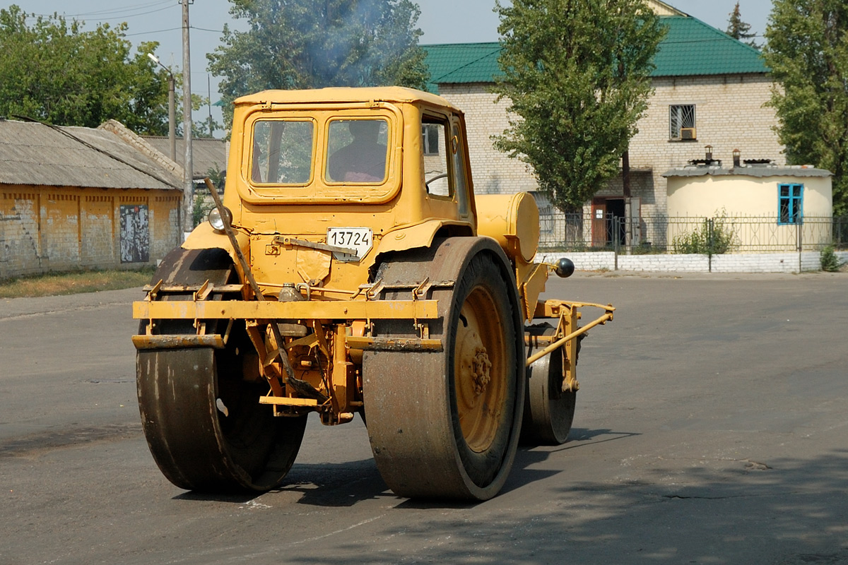 Асфальтовый каток на базе трактора МТЗ, г. Купянск, Харьковская область